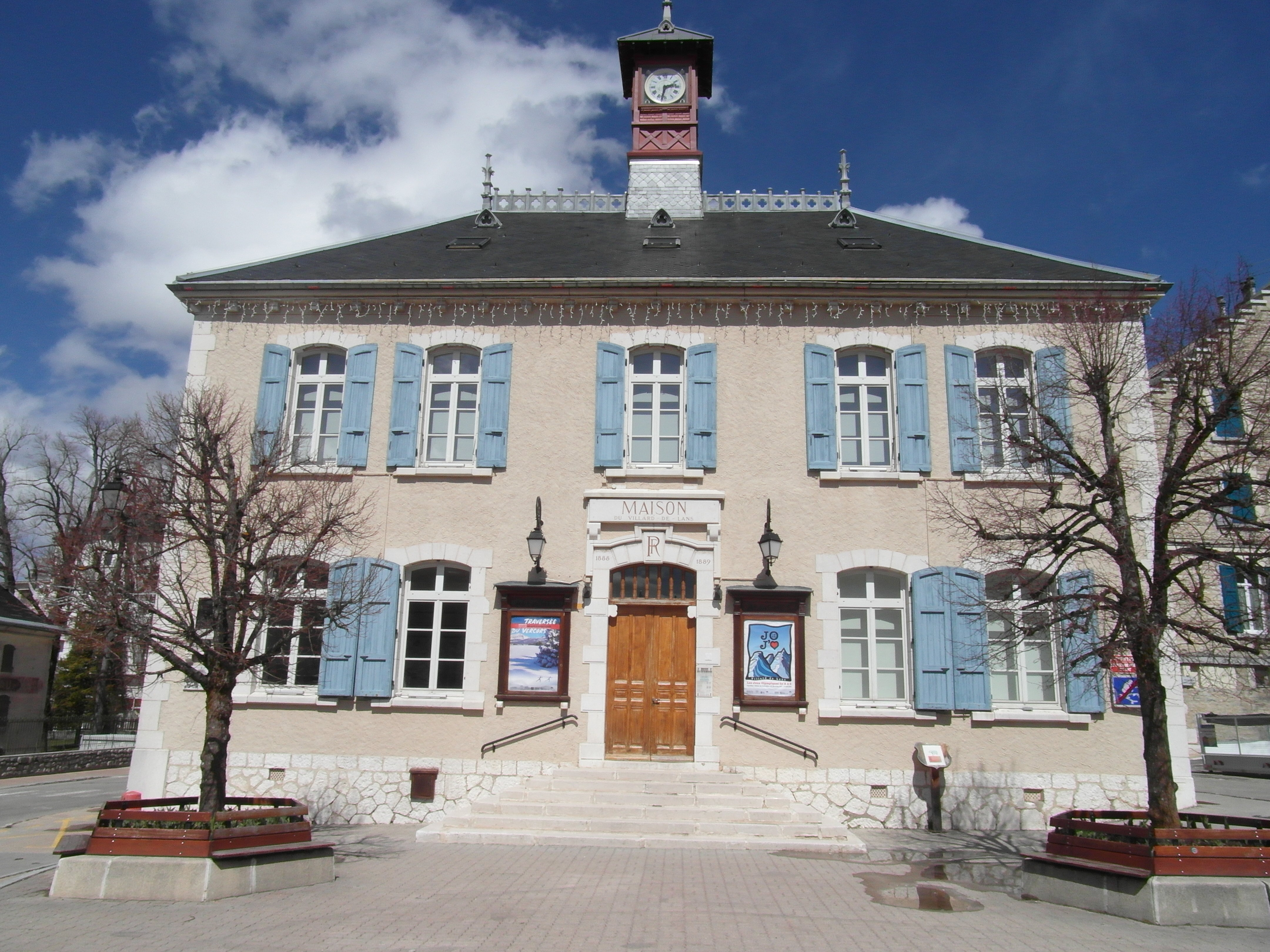 Maison du patrimoine